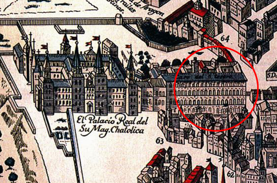 La imagen señala la situación de la Biblioteca Real borbónica en la Casa del Tesoro del Alcázar Real de Madrid durante la mayor parte del siglo XVIII.